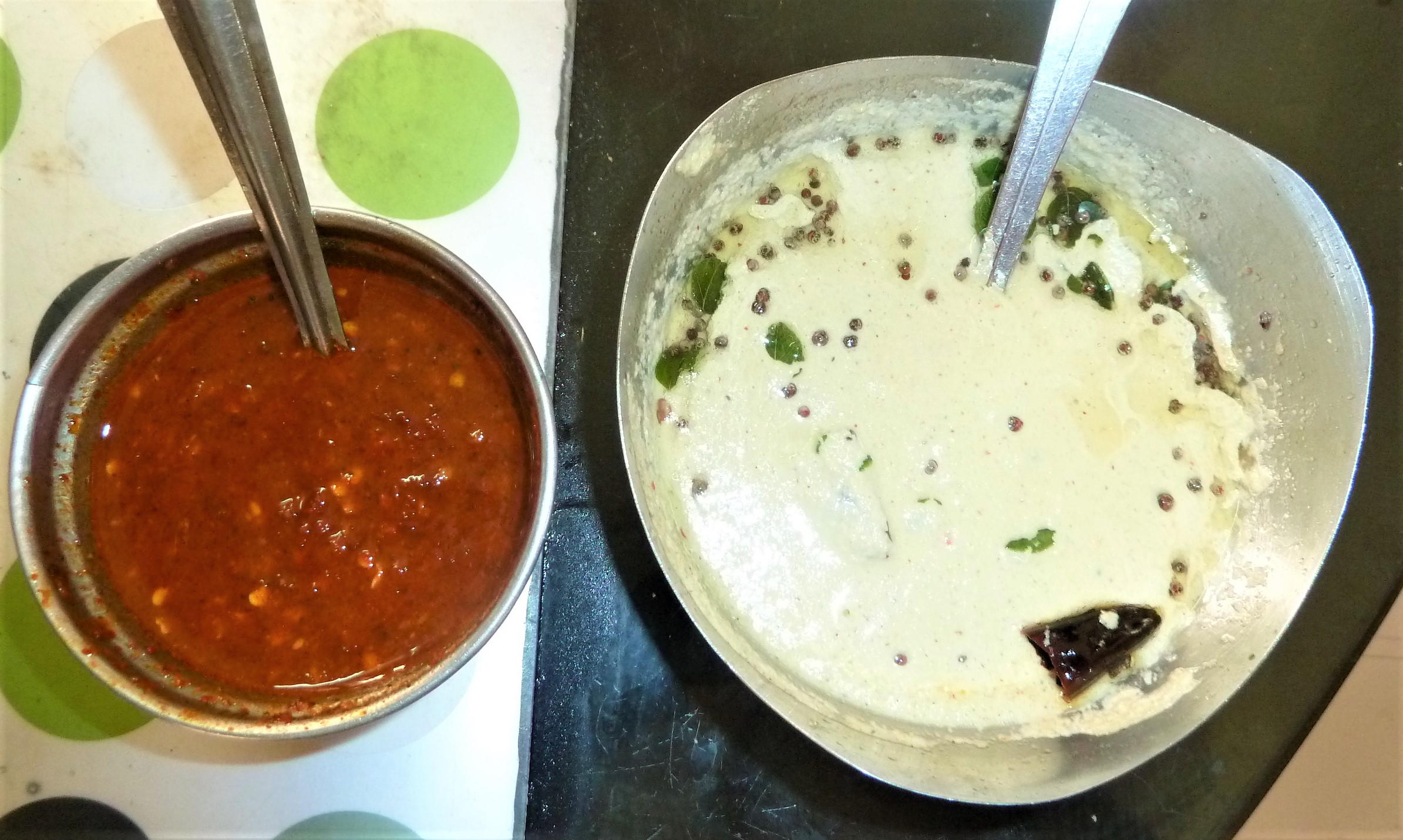 కొబ్బరి మరియు అల్లం చట్నీలు